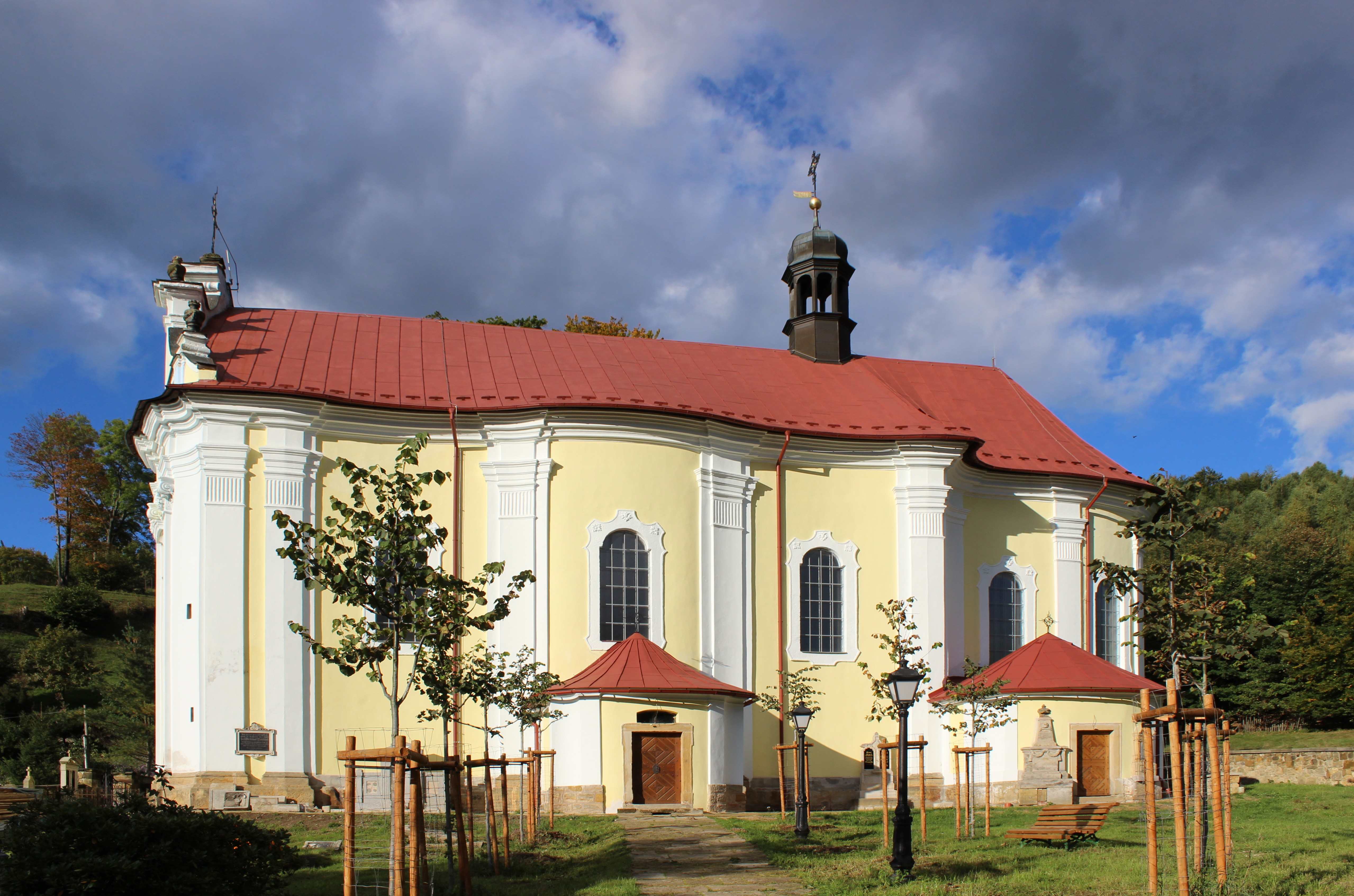 Kostel svatého Petra a Pavla v Horním Prysku.